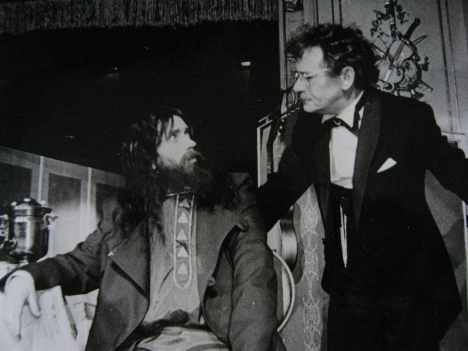 Сцена из спектакля «Гришка Распутин» Санкт-Петербургского драматического театра «Патриот» РОСТО. Николай Феоктистов в роли Двойника Распутина, Валерий Горбунов в роли банкира Рубинштейна, режиссёр-постановщик Егоров Геннадий Семёнович